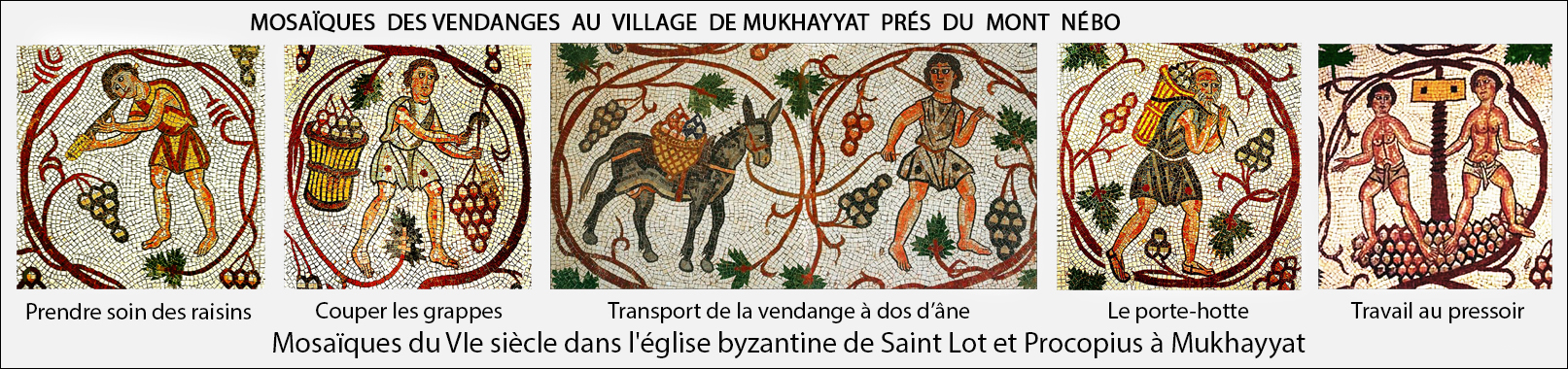 Mosaïques de l'église de Saint Lot et Procopius de Mukhayyat près du Mount Nebo. Photos prises avec et sans flash et avec une perche pour être bien au dessus de la mosaïque. Découpage et assemblage avec Photoshop.